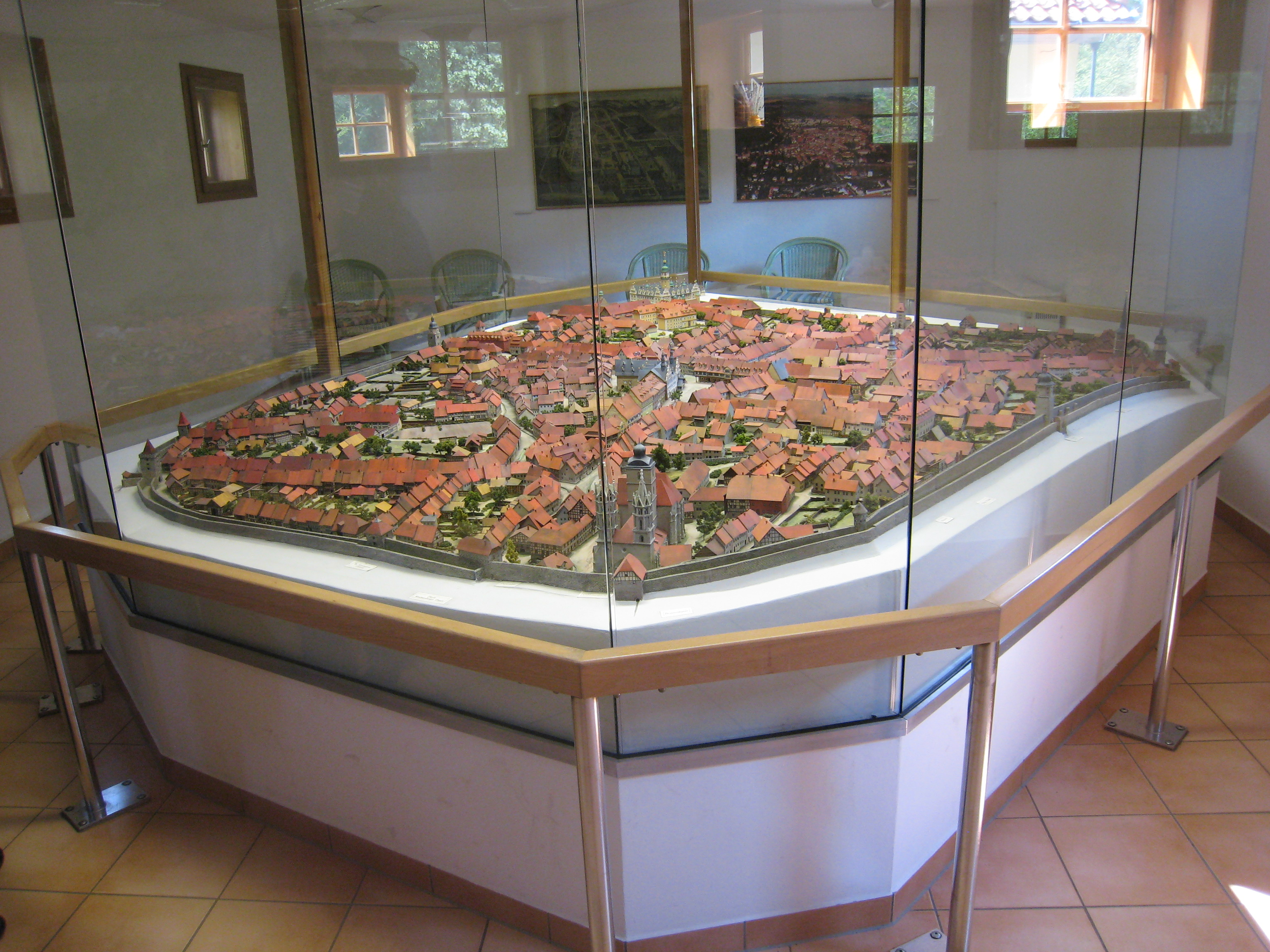 Stadtmodell von Arnstadt um 1740, im Gärtnerhaus im Schloßpark von Arnstadt